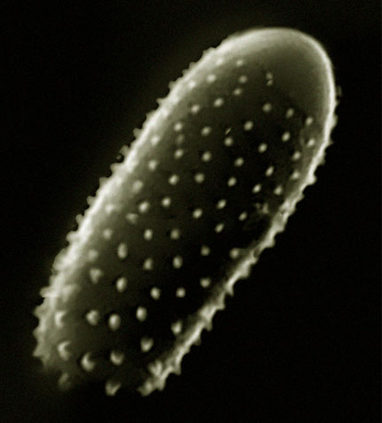 spore de Melampsora sp, champignon parasite de végétaux (peuplier notamment)